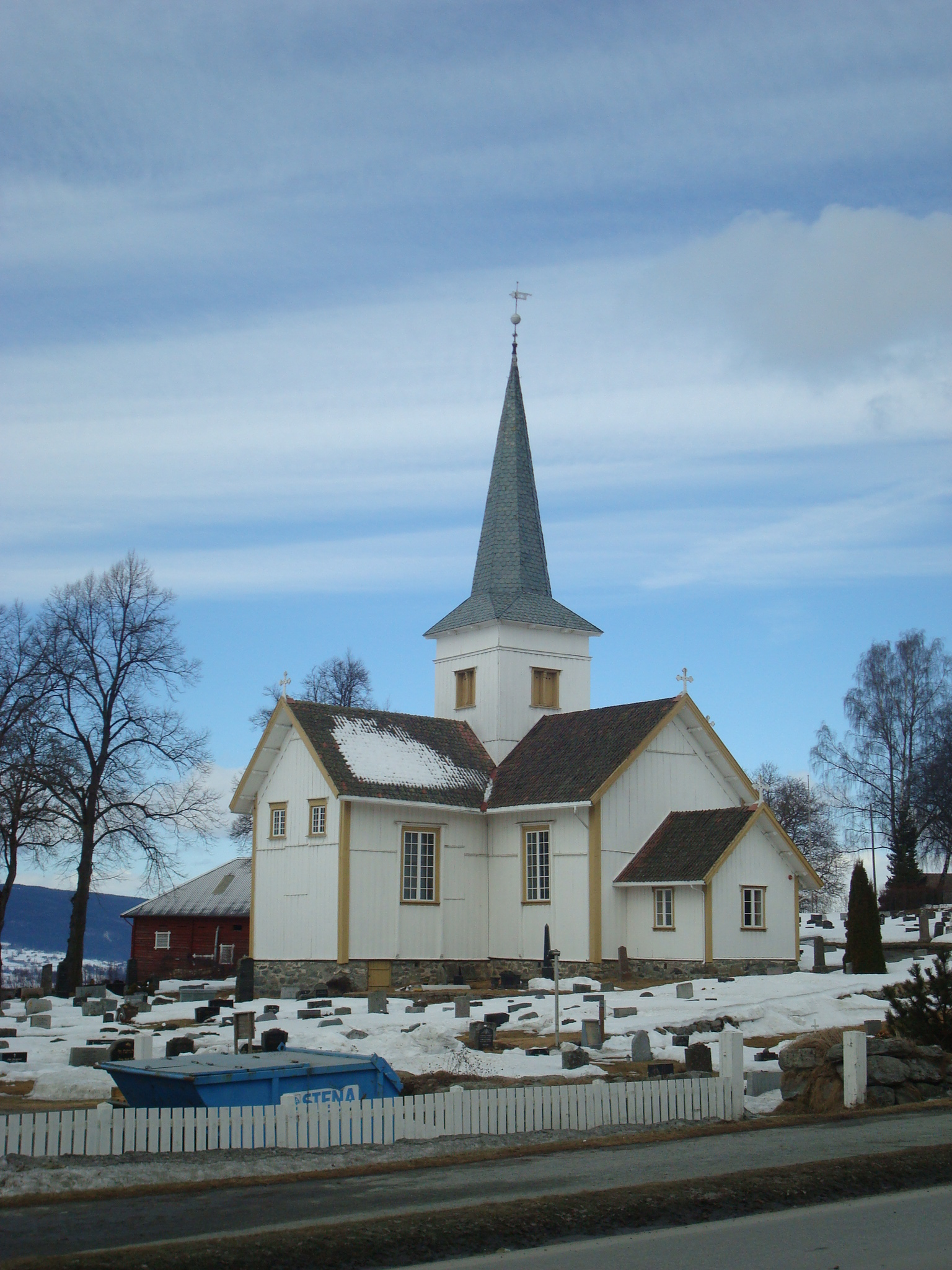 Hov kirke i Søndre Land